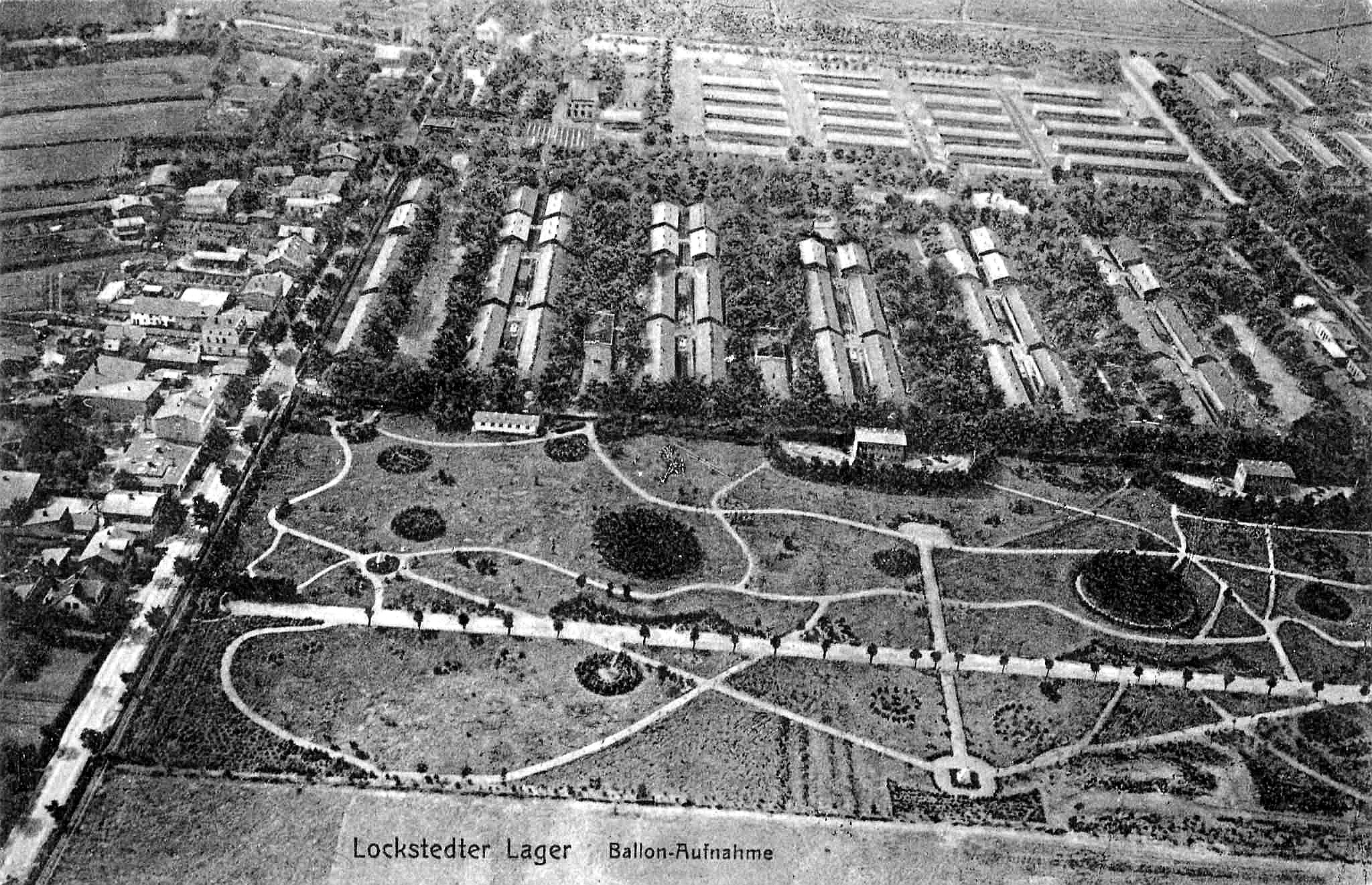 Lockstedter Lager (Truppenübungsplatz und Kasernen), Luftaufnahme aus einem Ballon im Jahr 1908.